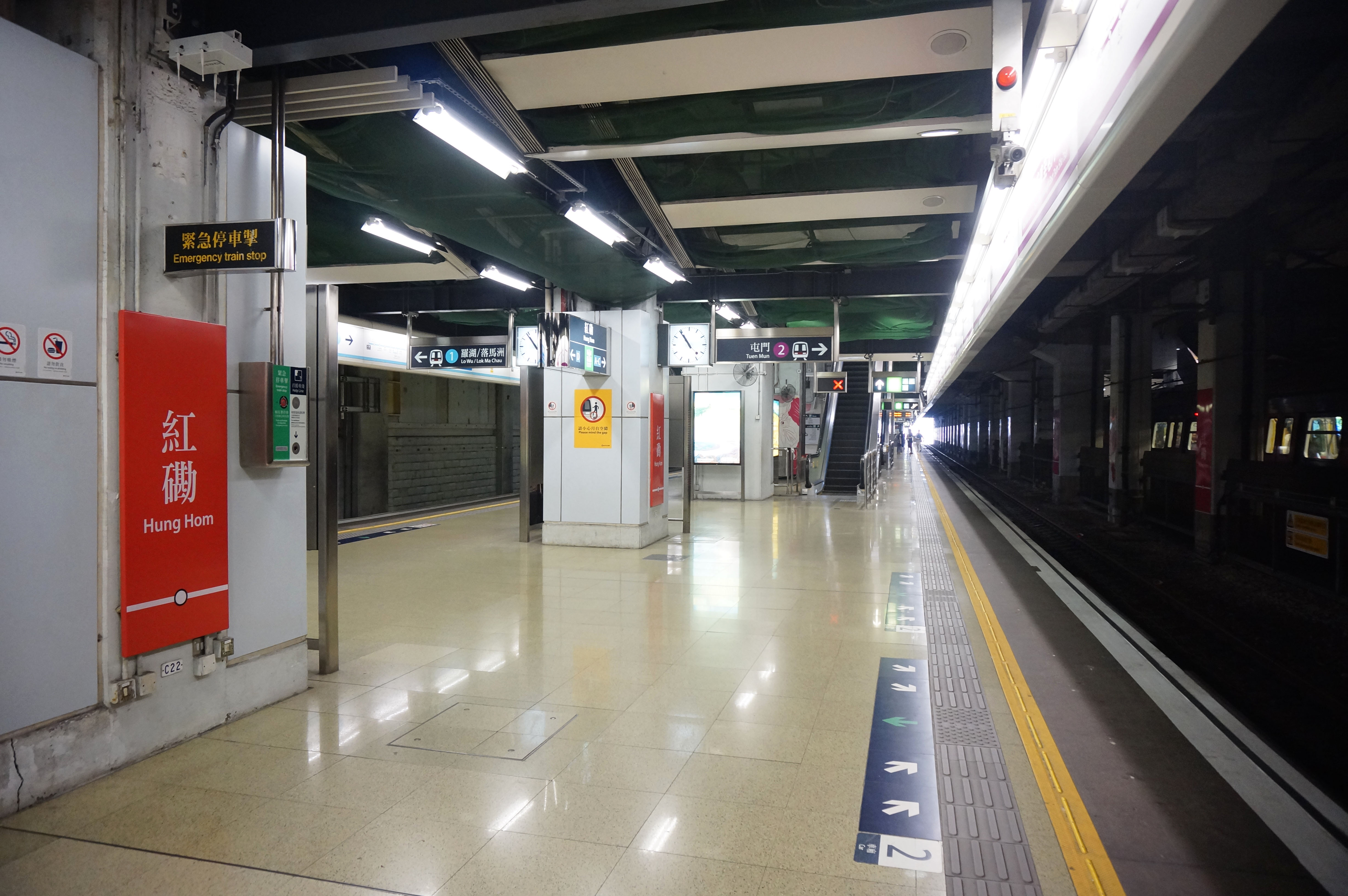 港鐵紅磡站月台